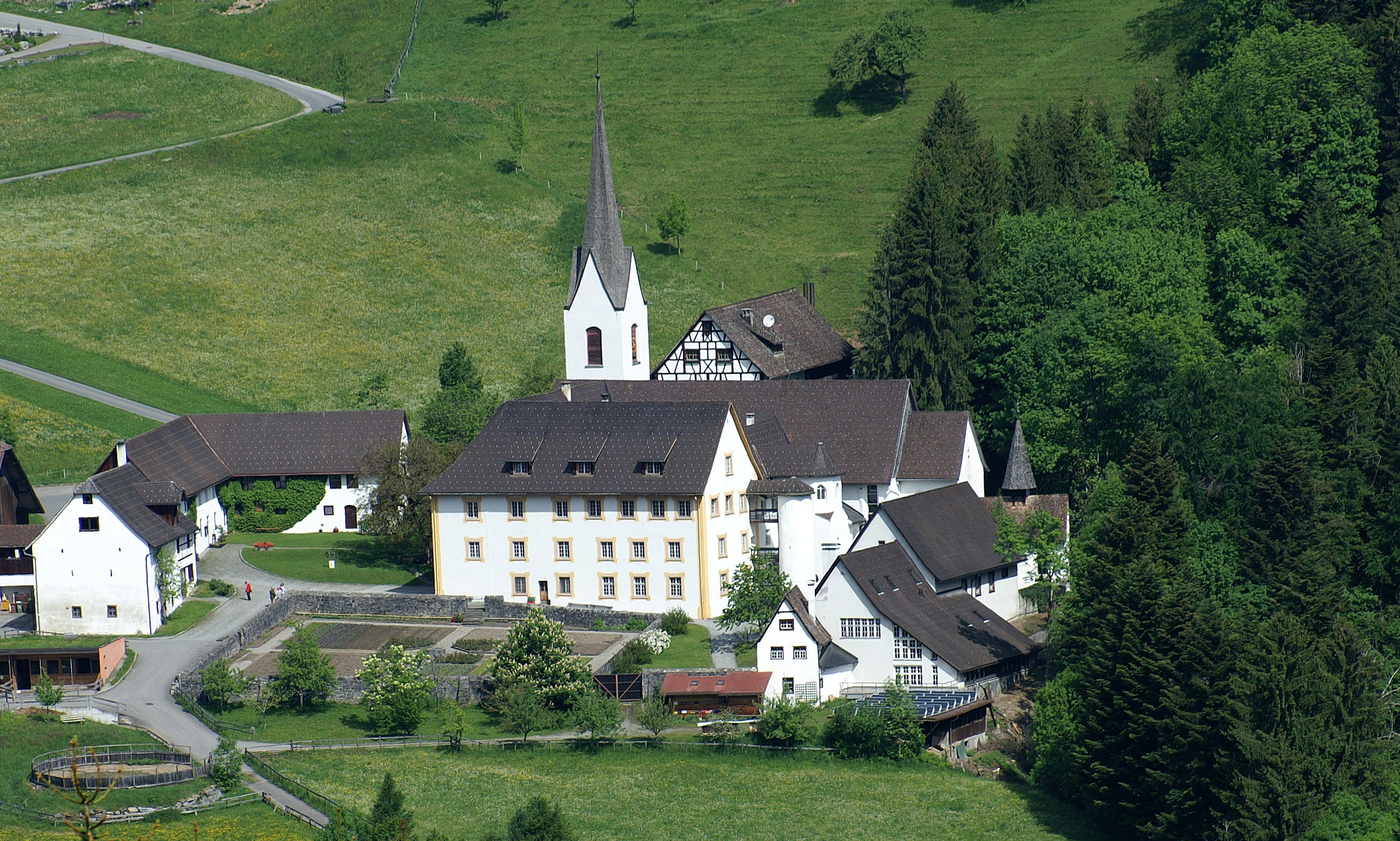 Benediktinerpropstei Sankt Gerold im grossen Walsertal, Vorarlberg. Veröffentlicht: Georg Kessler in "Freizeit im Ländle, Die schönsten Ausflugziele in Vorarlberg ISBN 978-3-7022-3068-5 2010.